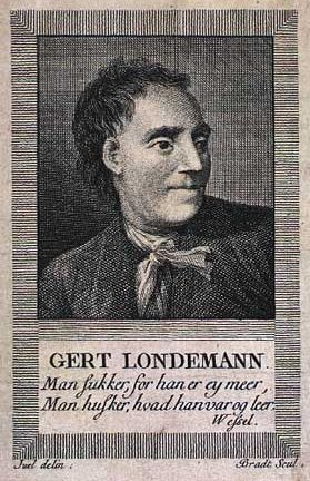 Gert Londemann (1718-1773), dansk skuespiller. Digt af Johan Herman Wessel, 1784, med teksten:Man sukker, for han er ey meer, Man husker hvad han var, og leer.